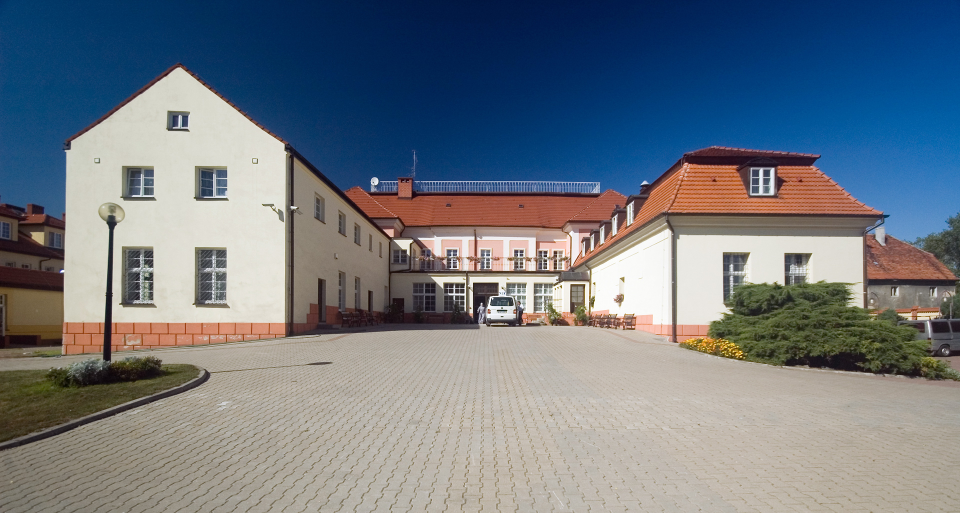 Wierzbice, ul. Lipowa 44 - pałac, obecnie zakład opiekuńczo-leczniczy (zabytek nr A/3855/1819)